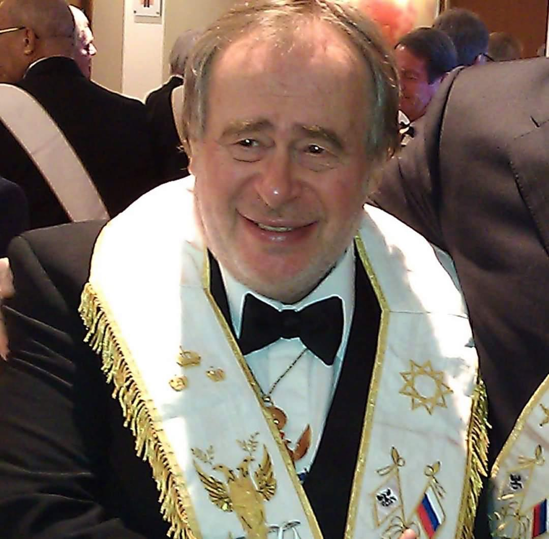 Lopukhin Vladimir 33